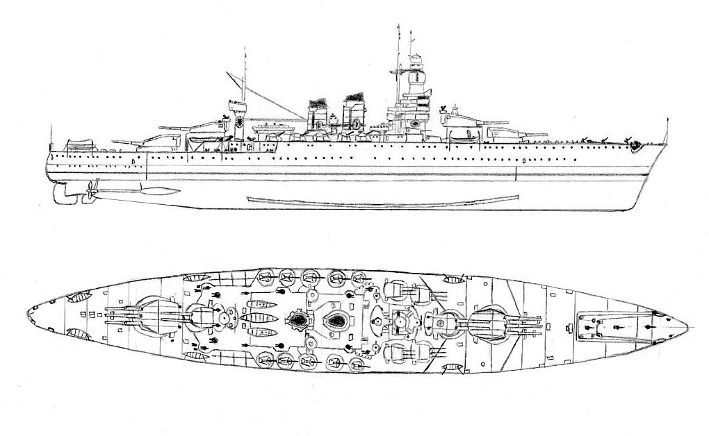 Схема итальянского линкора "Андреа Дориа".